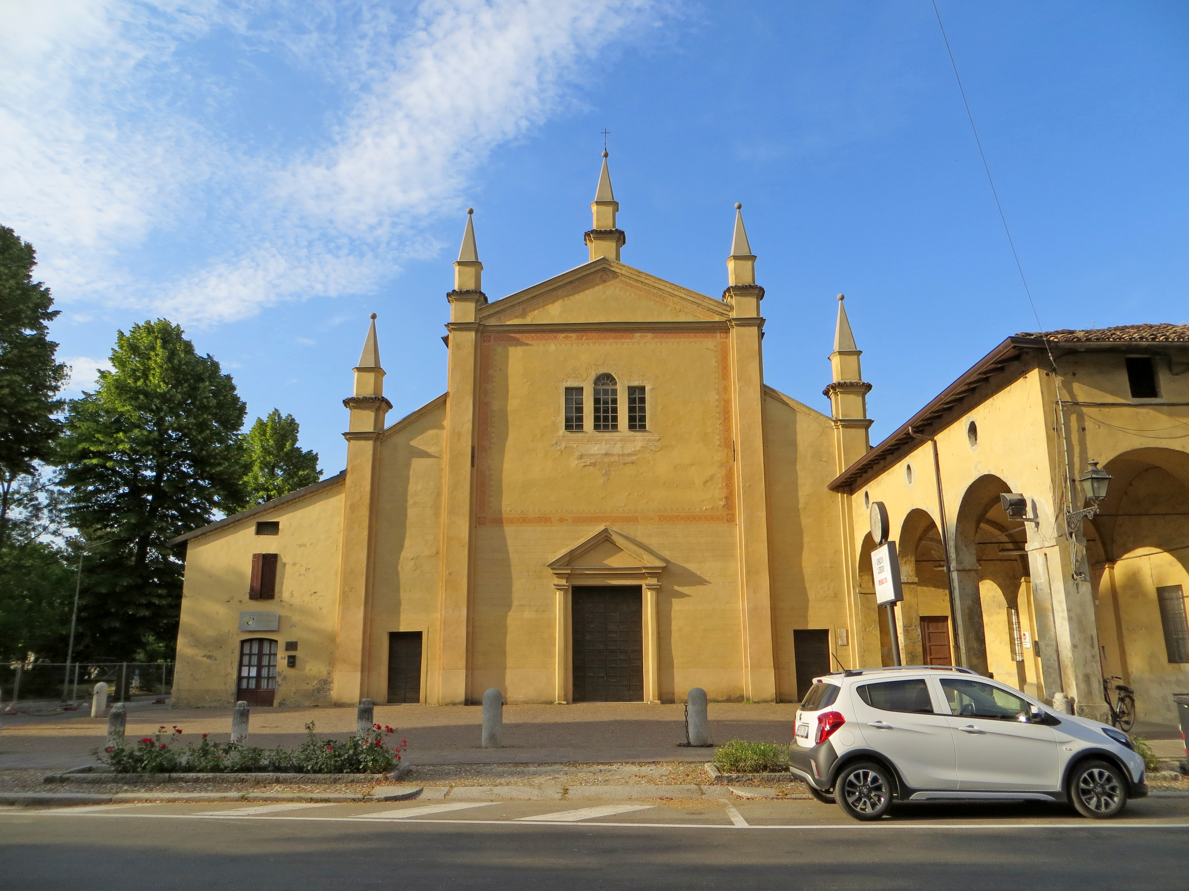 Chiesa della Beata Vergine del Carmine (Soragna) - facciata